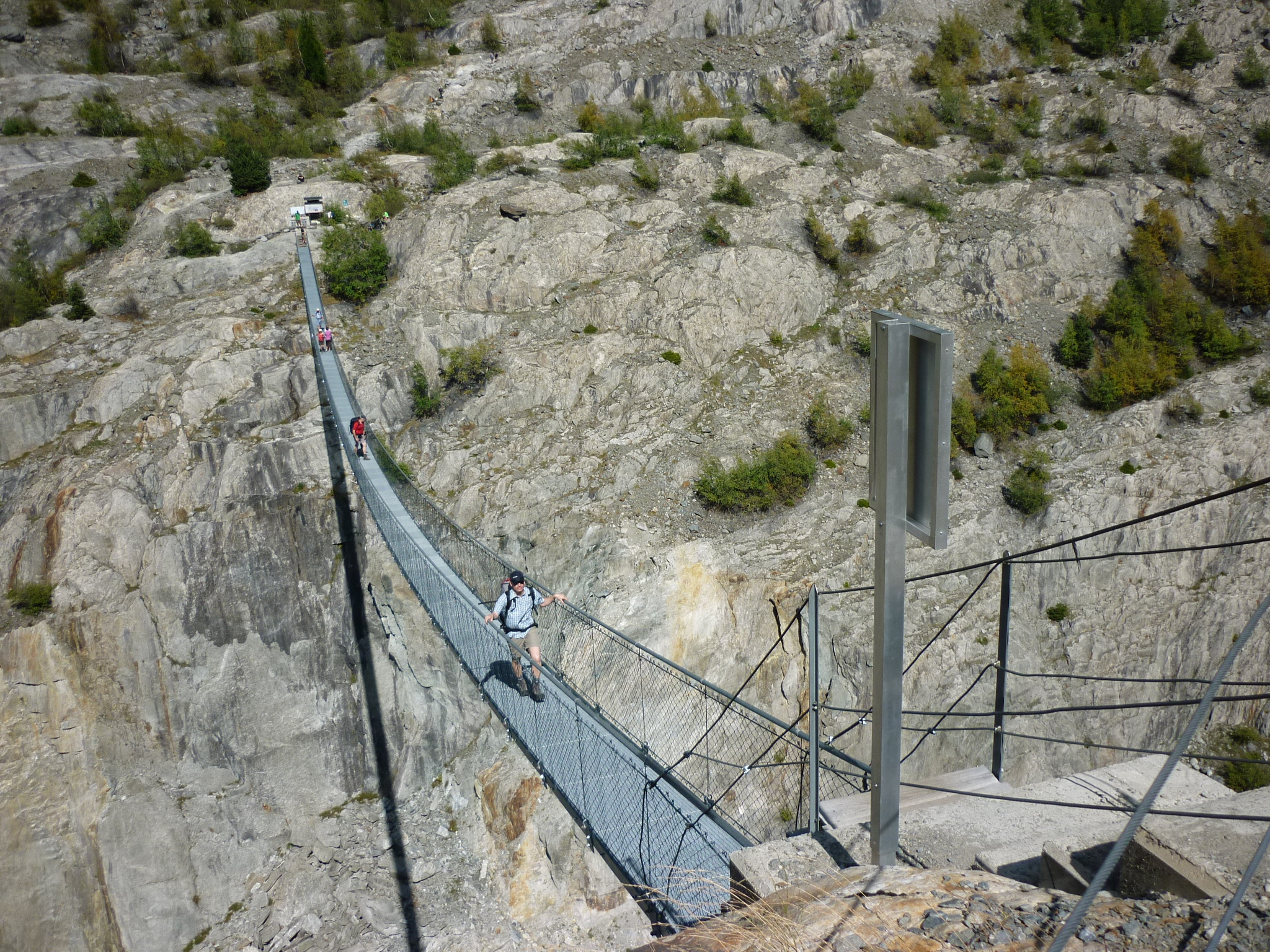 Hängebrücke über die Massaschlucht, Aletschgletscher, Schweiz